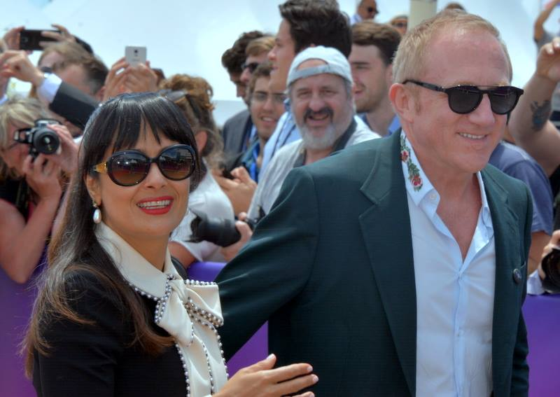 Salma Hayek et François-Henri Pinault au festival de Cannes